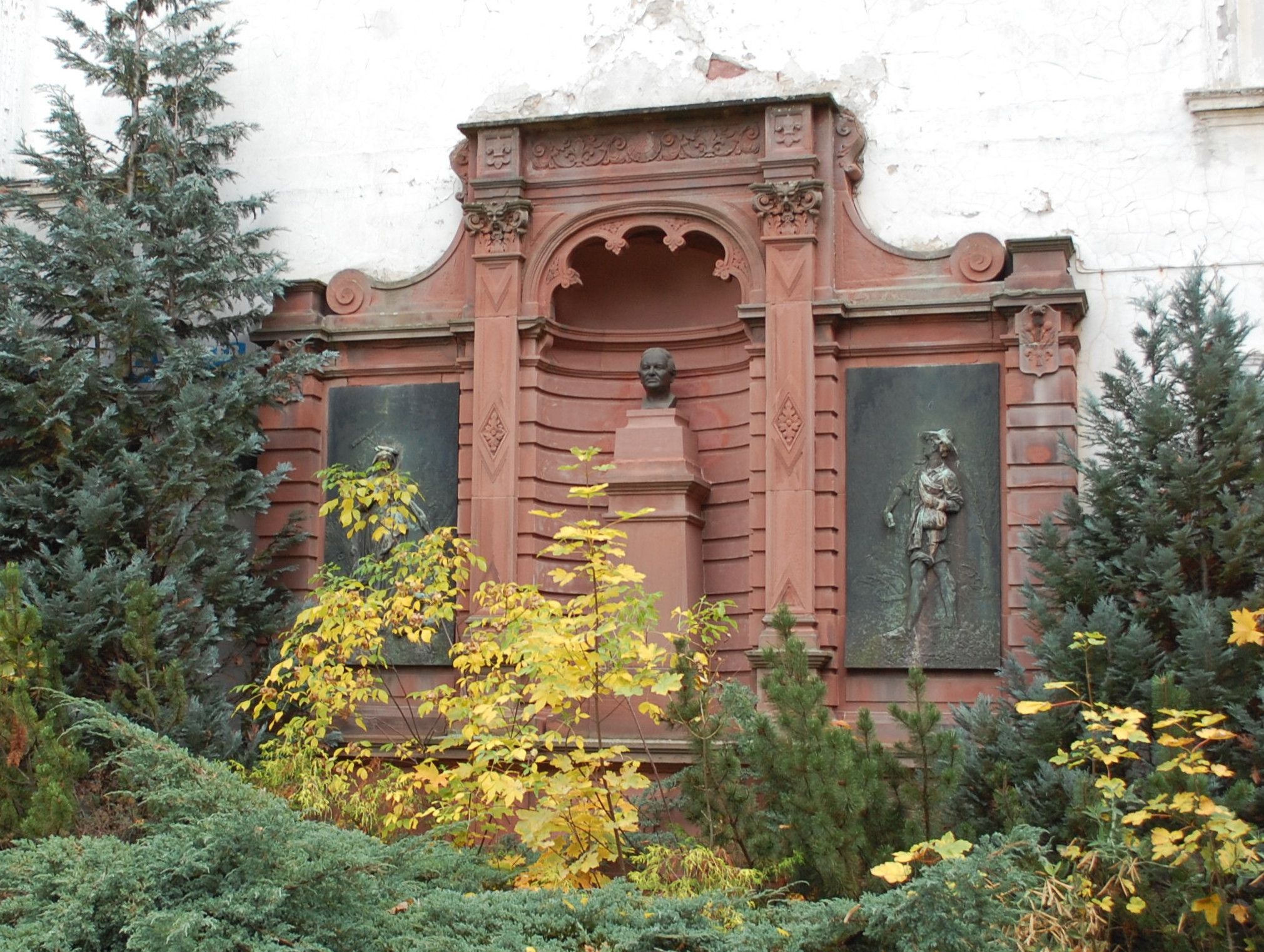 Denkmal Neuer Weg 21 in Quedlinburg